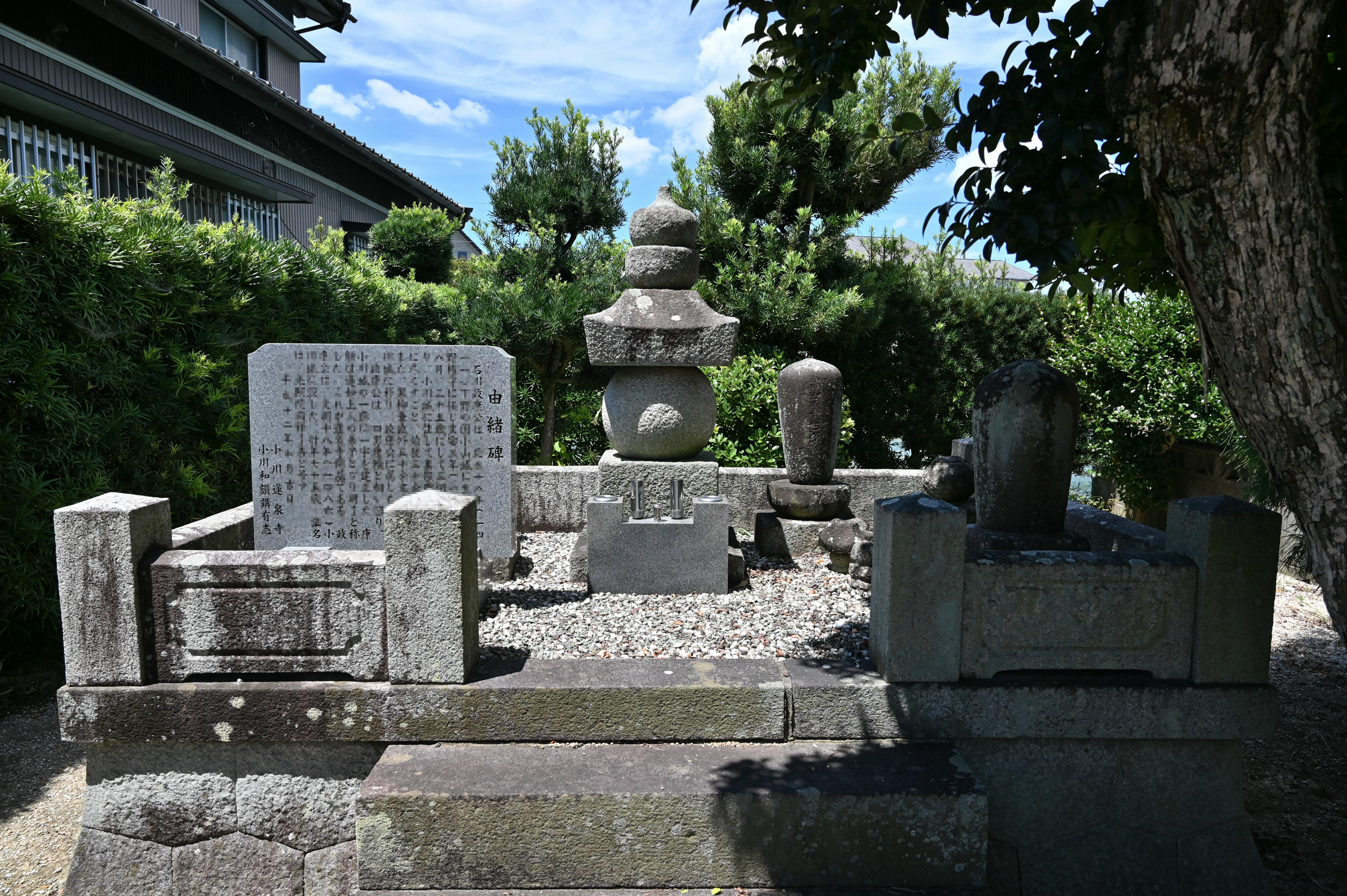 蓮泉寺にある石川政康の墓